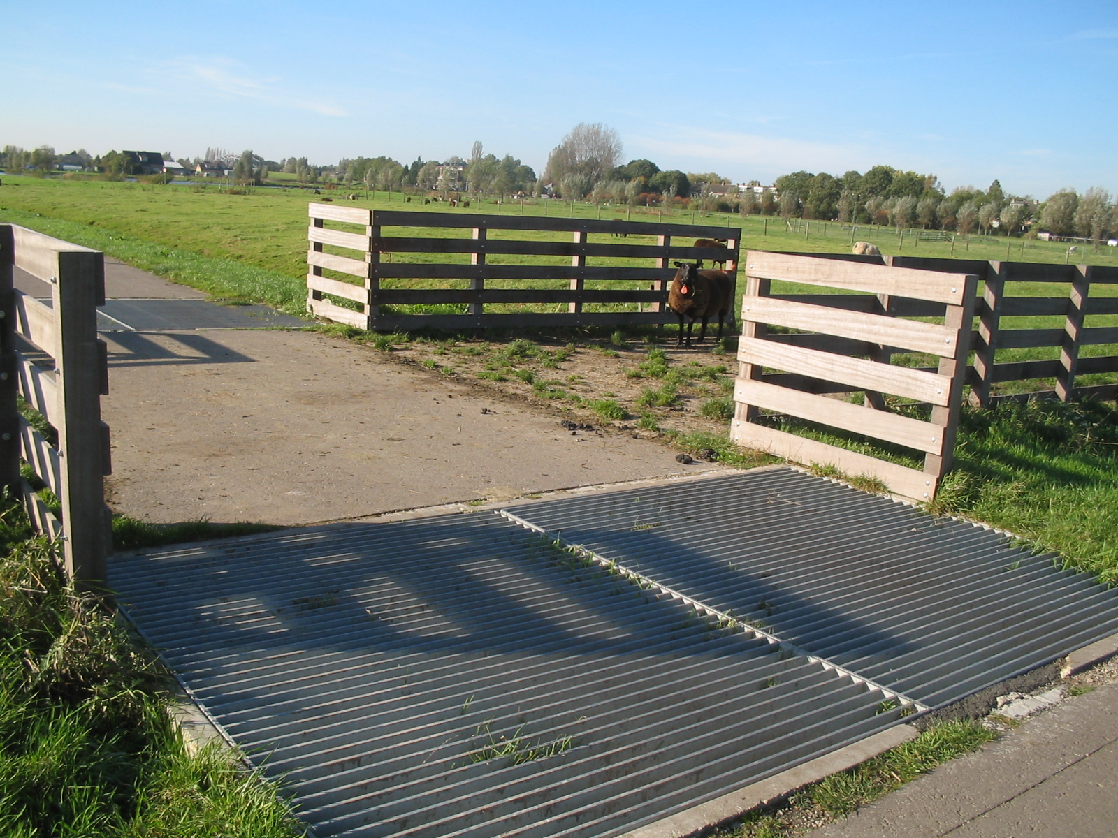 Veerooster in Schipluiden